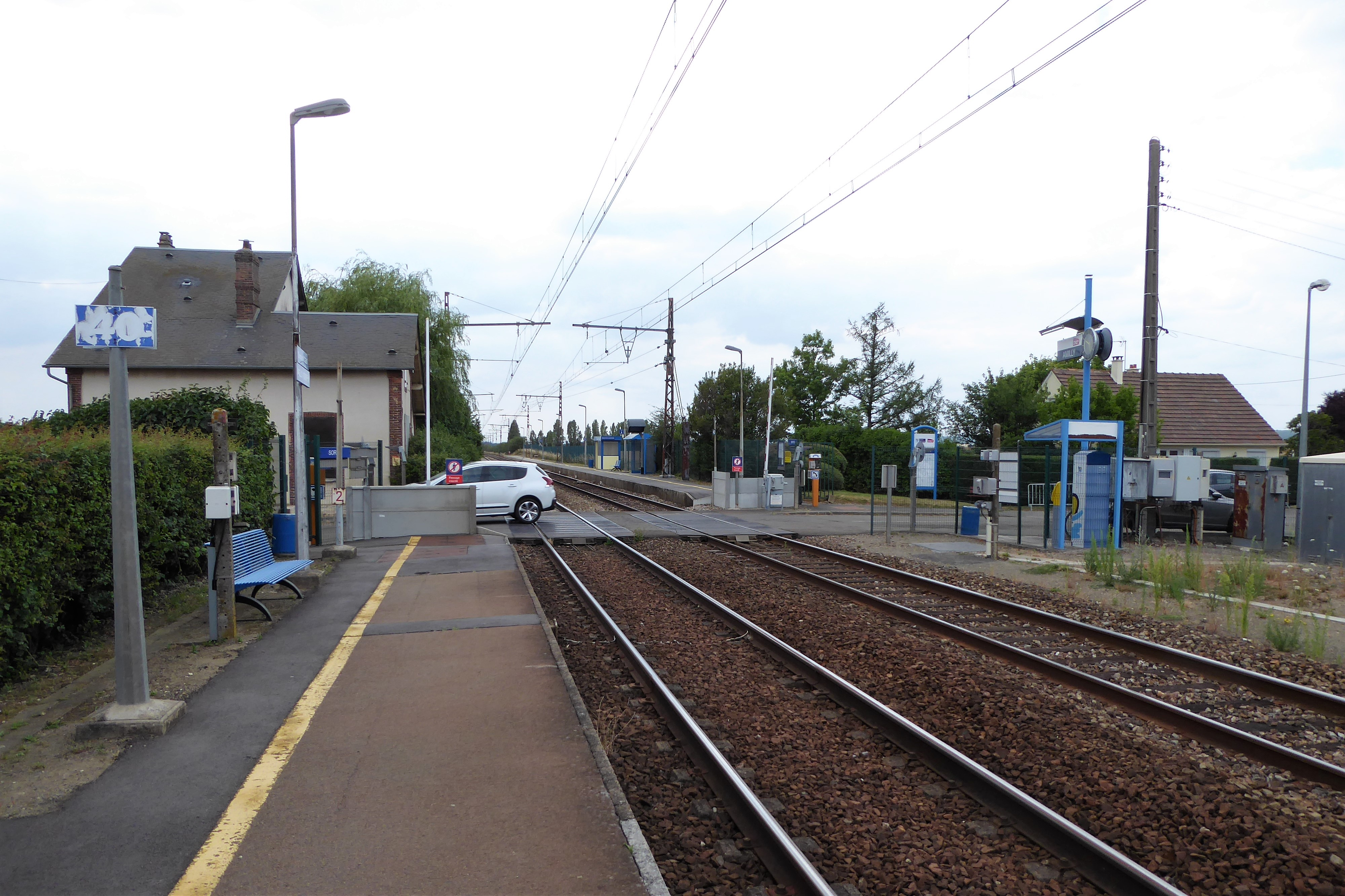 gare d'Amilly-Ouerray, Eure-et-Loir, France.